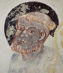 St. Georgen im Schauertal - Fresko: Hl. Leonhard (Ausschnitt)